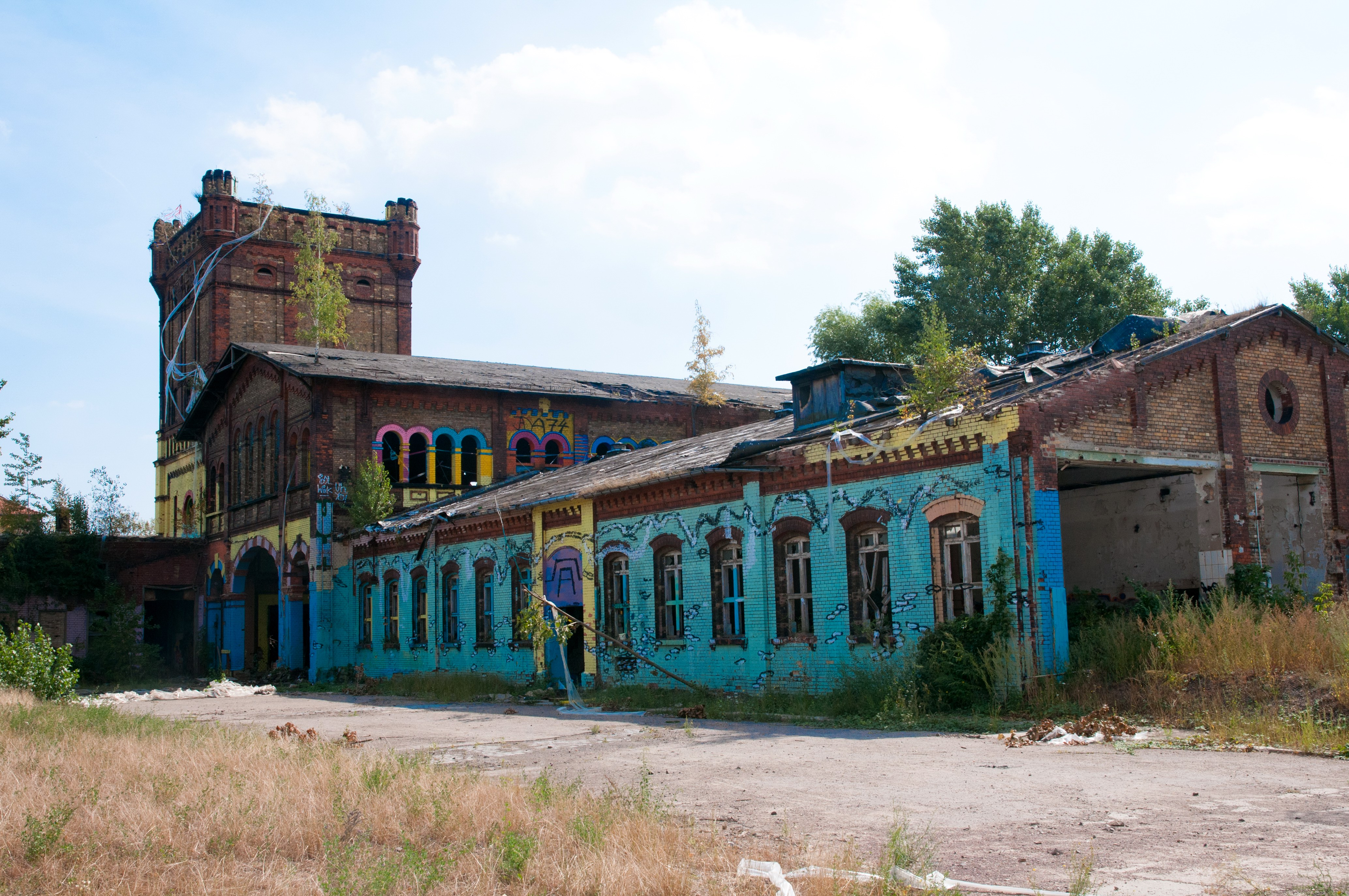 Freiimfelder Straße, ehemaliger Schlachthof in Halle (Saale)